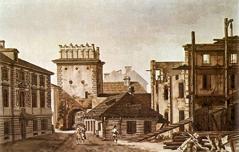 Widok Bramy Pobocznej. 1785. Akwarela. 38,4 x 58 cm. Muzeum Narodowe, Warszawa.